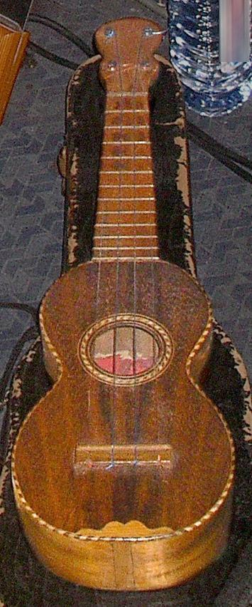 Un ukulélé hawaiien vintage de la première moitié du vingtième siècle